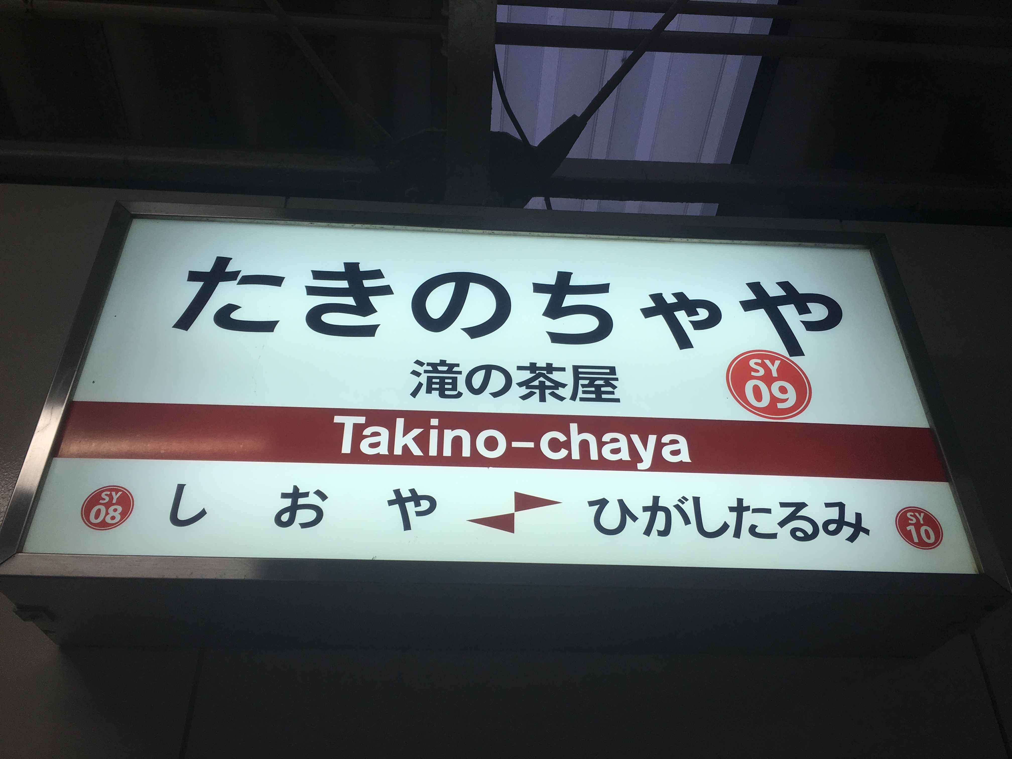 駅ナンバリングが入った山陽電気鉄道滝の茶屋駅の駅名標